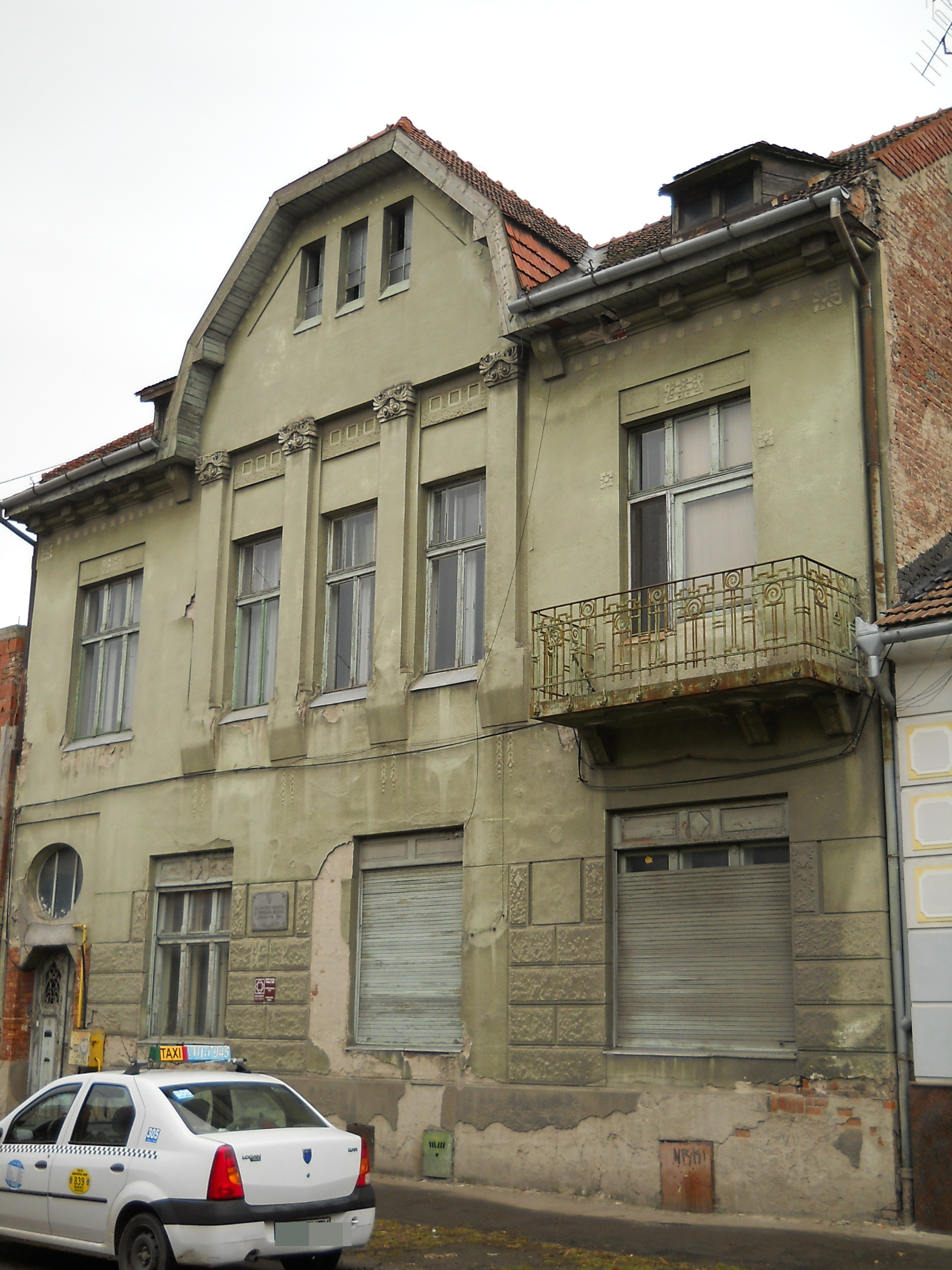 Vedere a palatului Tribuna